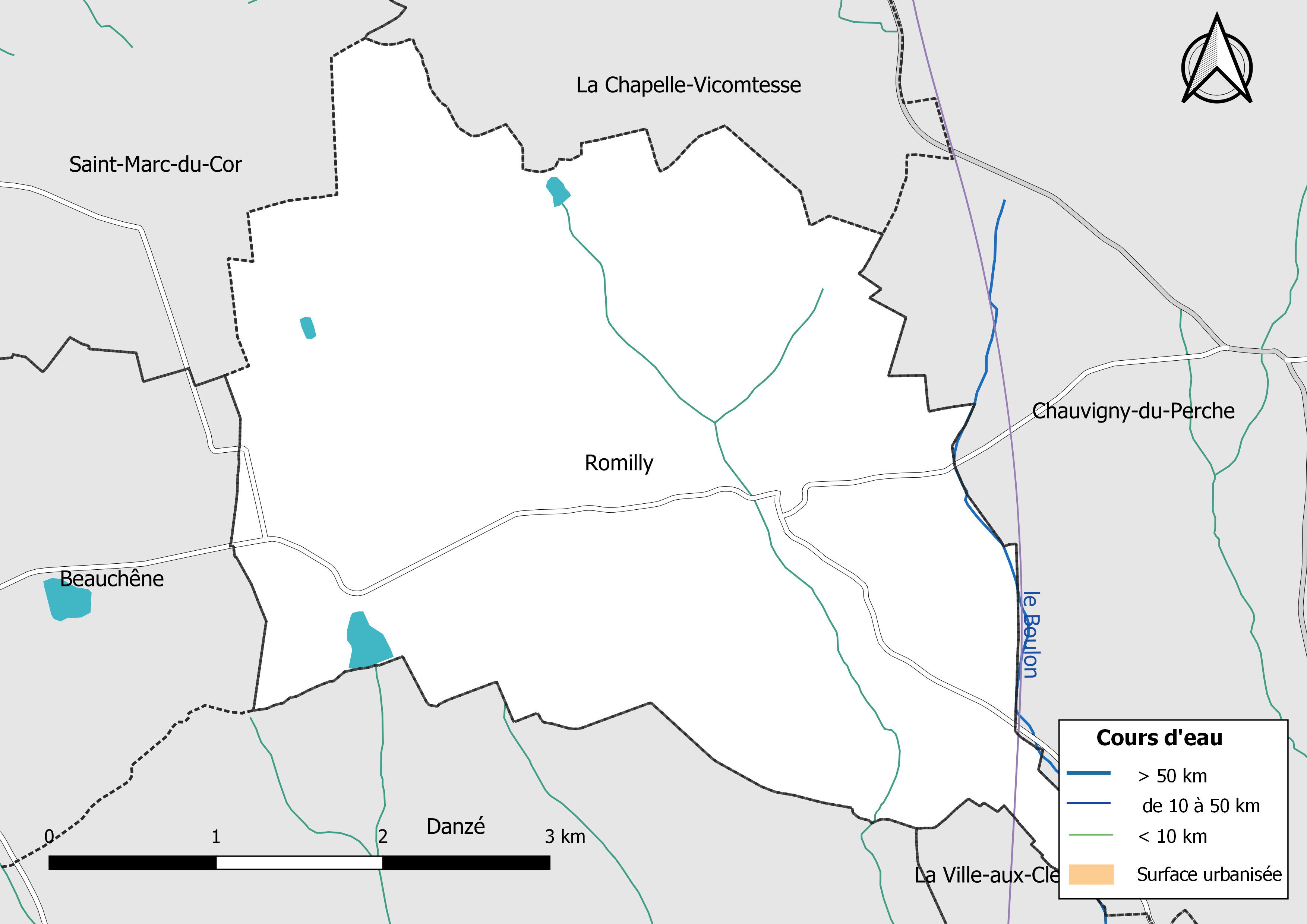 Carte du réseau hydrographique de la commune de Romilly (Loir-et-Cher), France.